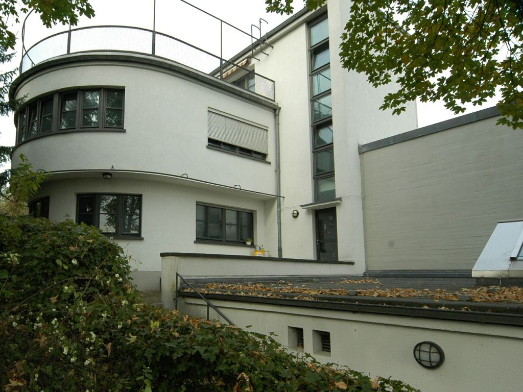 Hallgartenschule (Verwalterwohngebäude), Frankfurt am Main (1929-1930), Architekt: Ernst May, Namenspatron der deutsch-amerikanische Bankier und Mäzen Charles Hallgarten Photo: Joachim Hensel-Losch